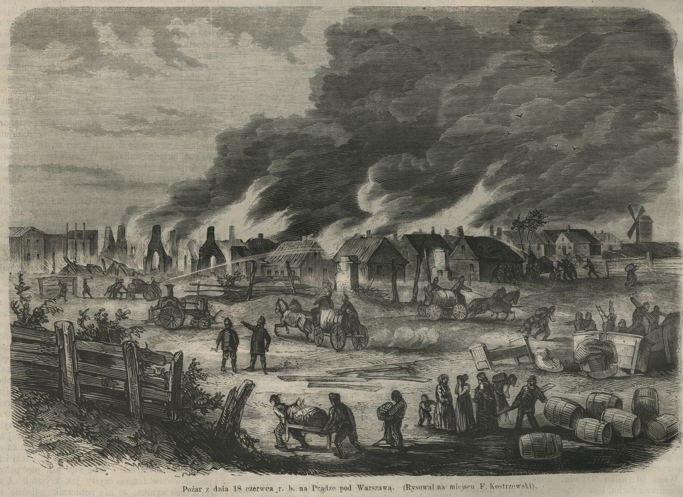 Pożar z dnia 18 czerwca 1868 na Pradze pod Warszawą